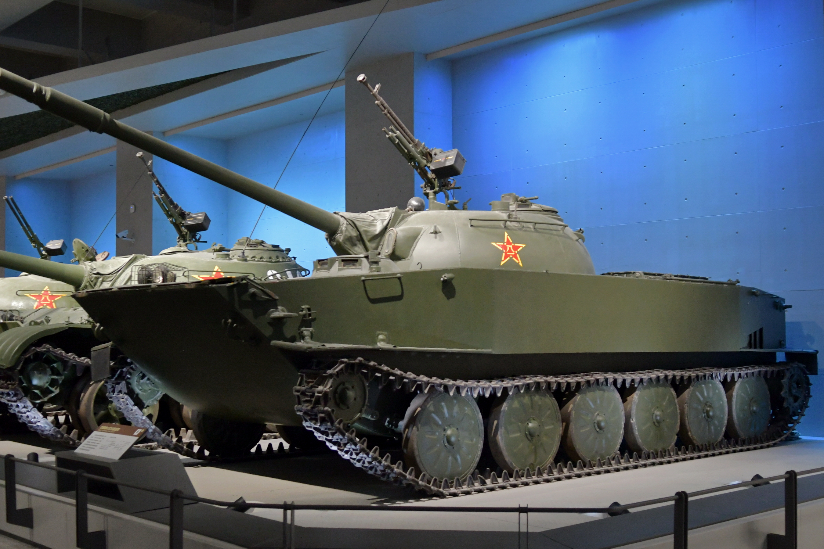 63式水陆两用坦克, 保存在中国人民革命军事博物馆.